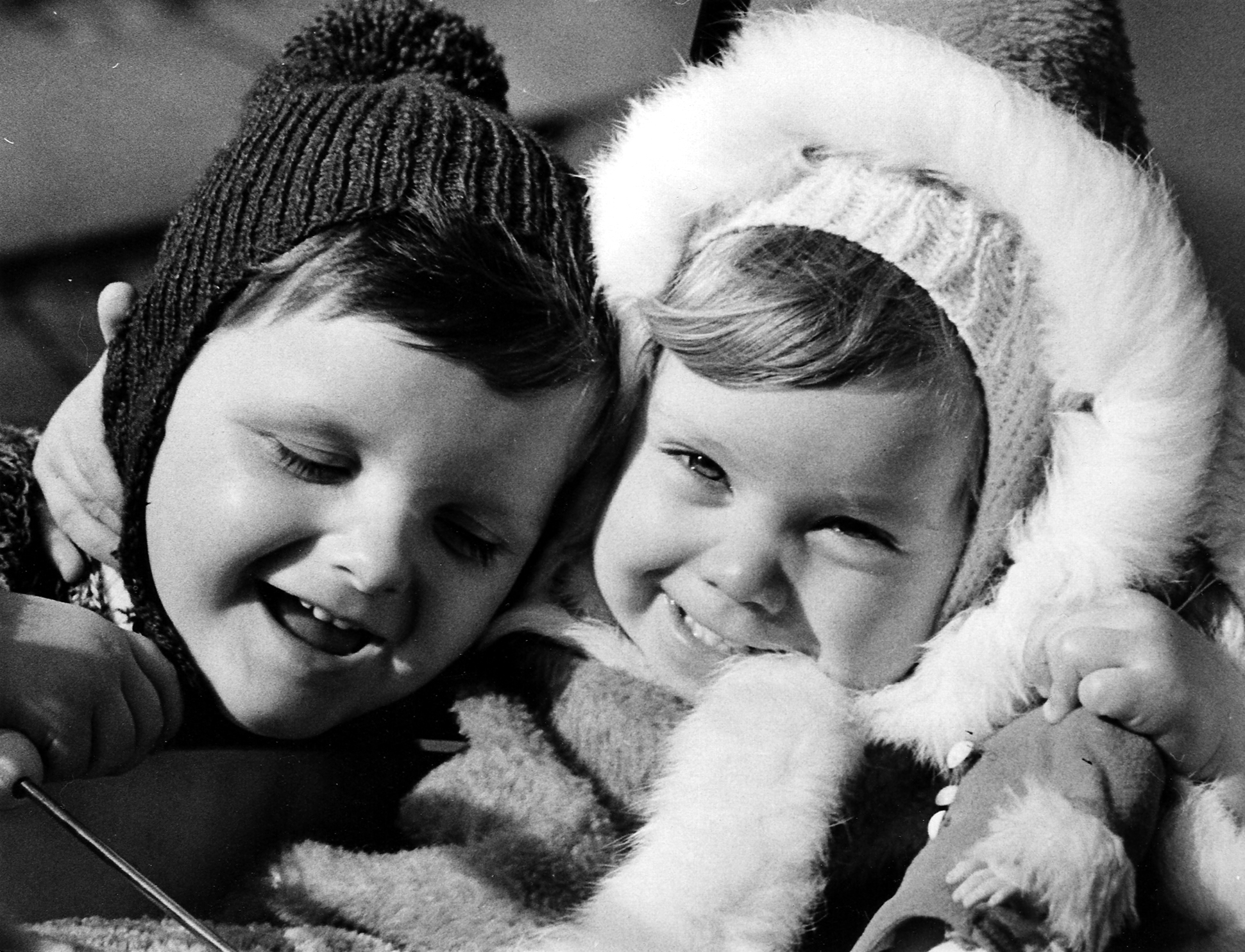 Peter und Elisabeth